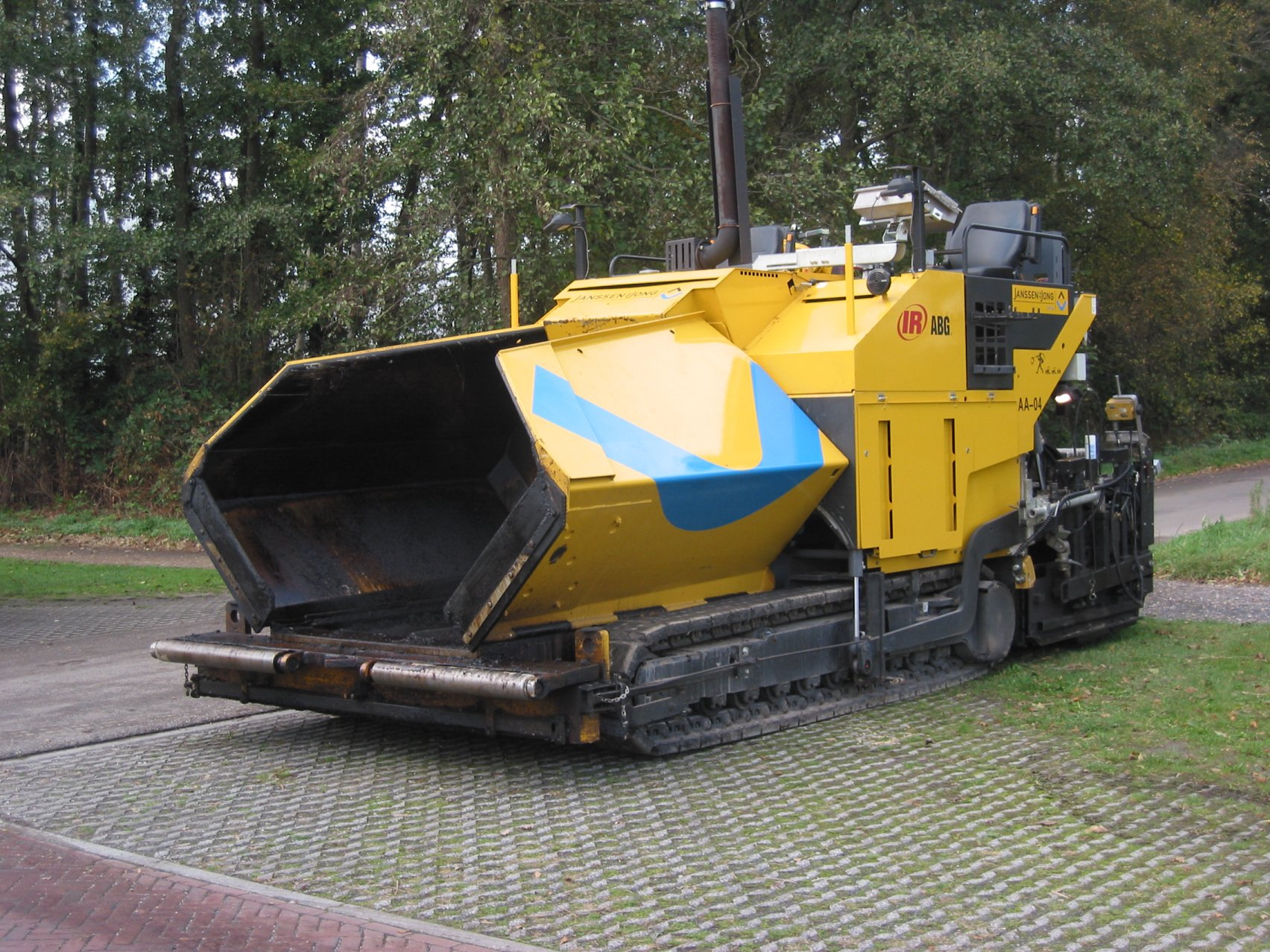 asfalteermachine